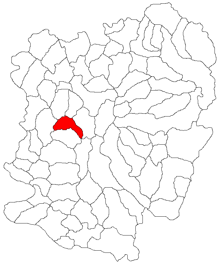 Categorie:Hărţi ale judeţului Caraş-Severin